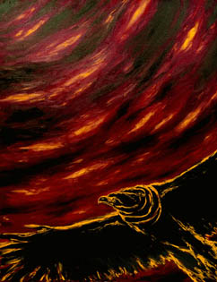 “Adler und schlange”, Lena Hades’ Ich bin Urheberin dieses Bildes. 10:45, 23. Jun 2005 Hlamo 242 x 315 (28750 Byte) (|?Adler und schlange?, Lena Hades? Gemaelde aus dem Zyklus Also sprach Zarathustra 1997, 137 x 177 cm. PD )